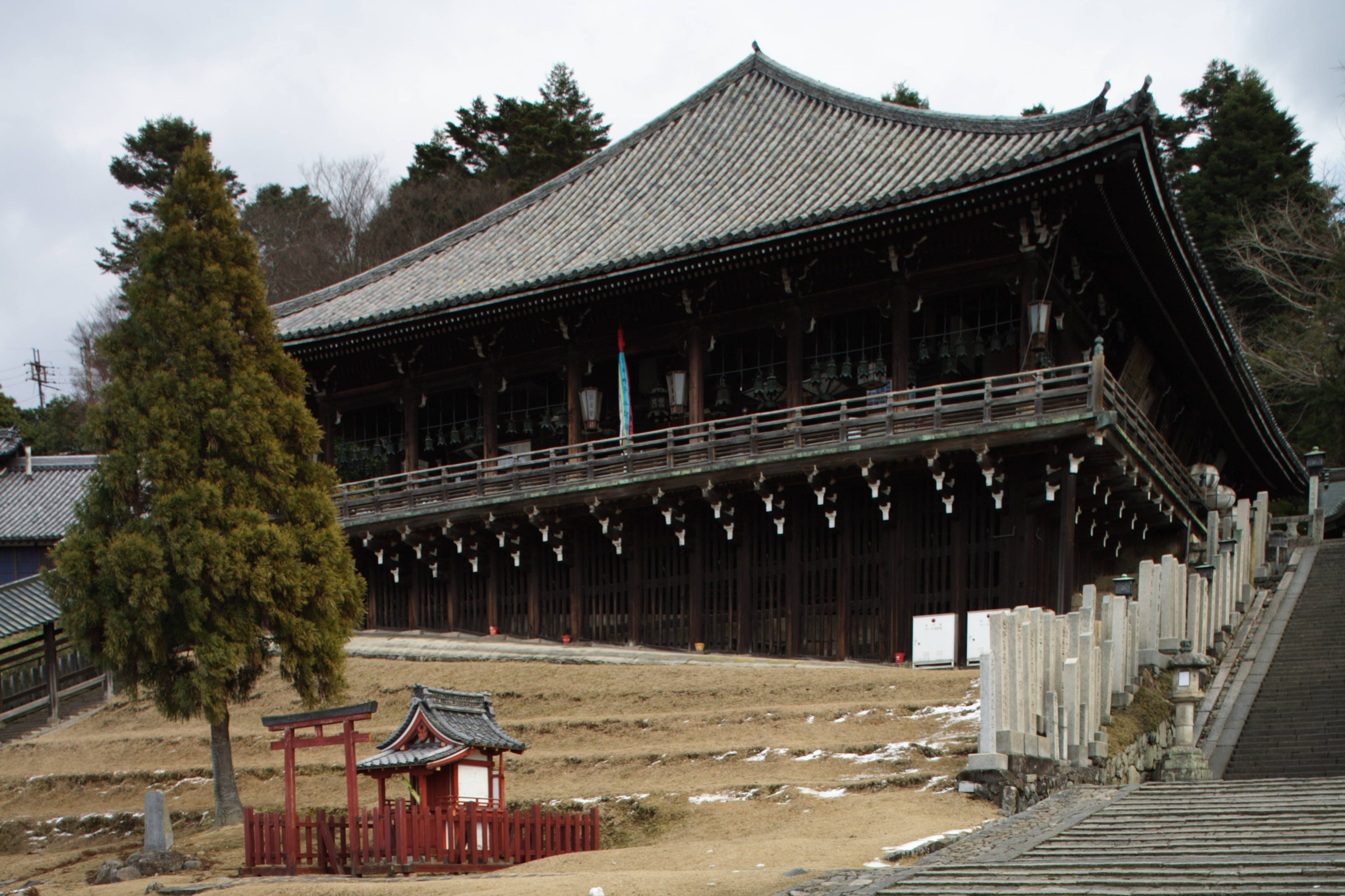 Nigatsu-dou in Todaiji/東大寺二月堂